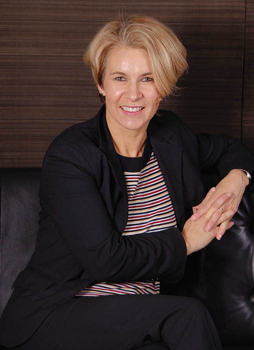 Elke Twesten, Landtagsabgeordnete Niedersachsen, 16. Wahlperiode (Fotoprojekt Landtagsabgeordnete Niedersachsen am 24. und 25. November 2009)